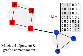 Matrice d'adjacence et graphe correspondant, avec hilight